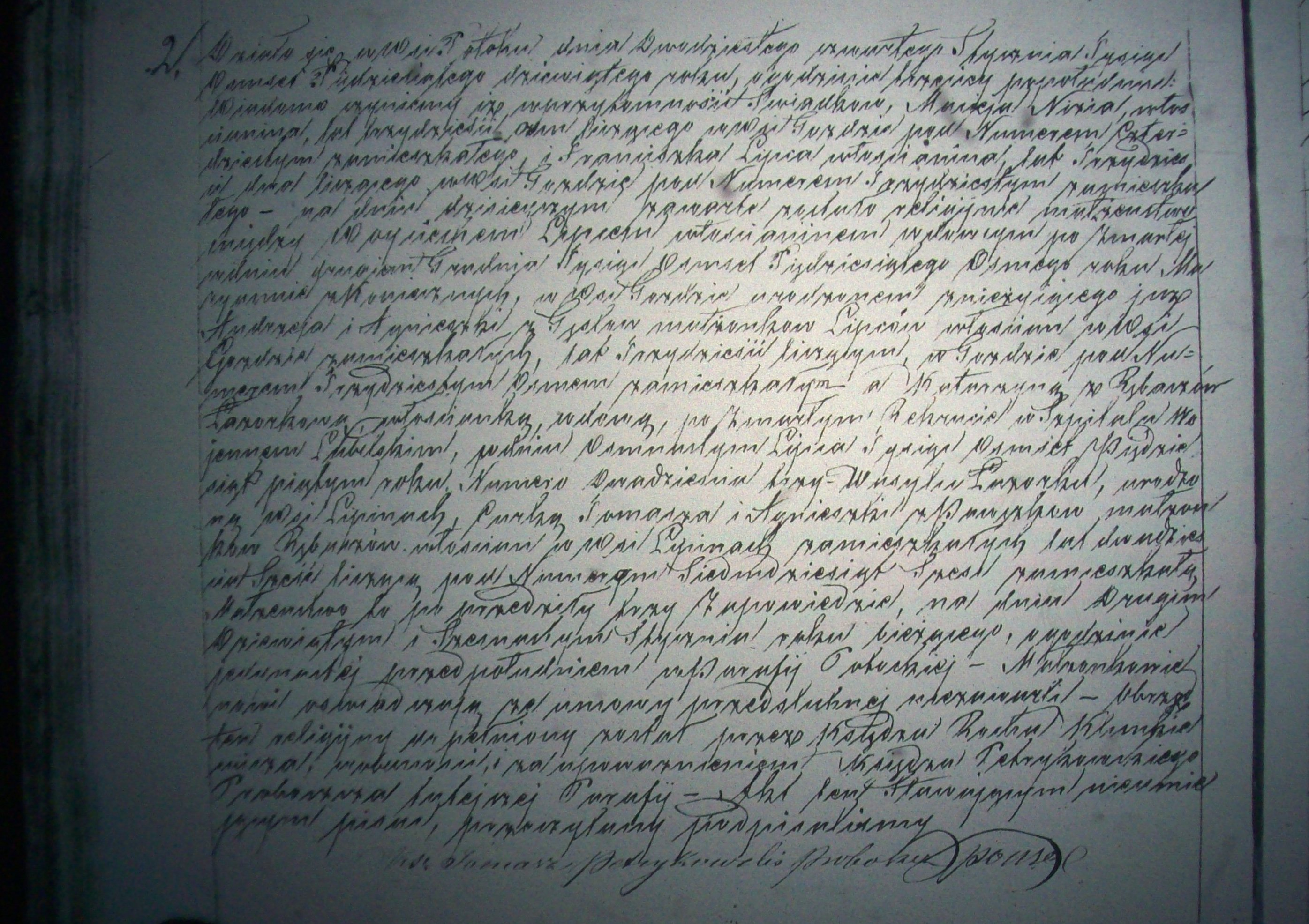 Wpis aktu małżeństwa z roku 1859